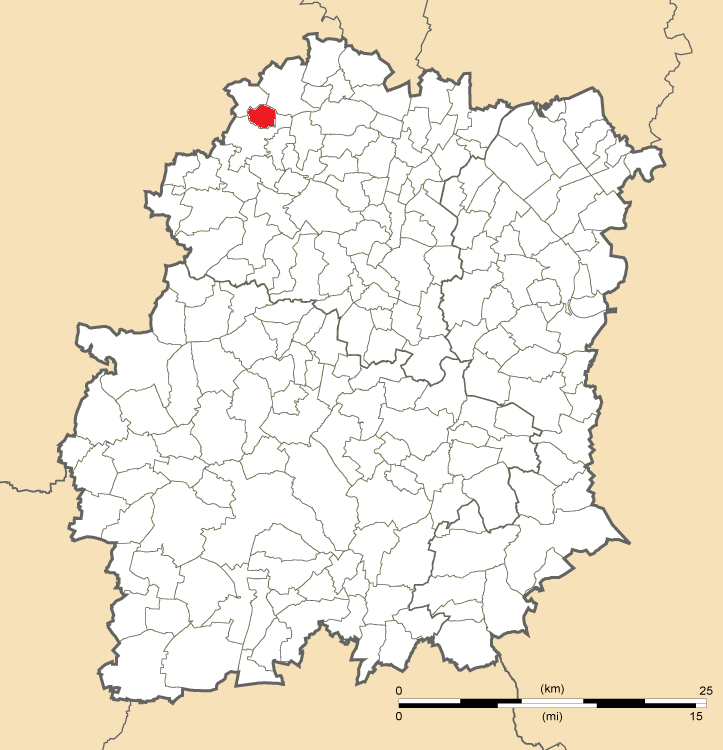 Carte de position de Saint-Aubin en Essonne (91)